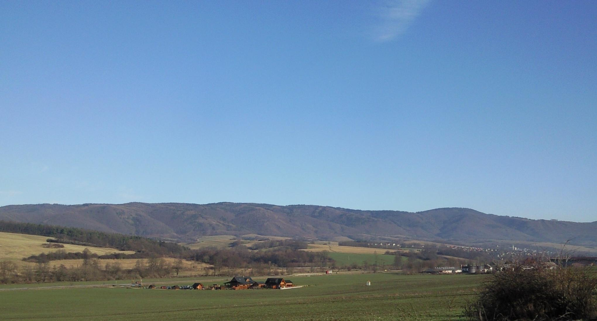 Handlovská kotlina od Banskej